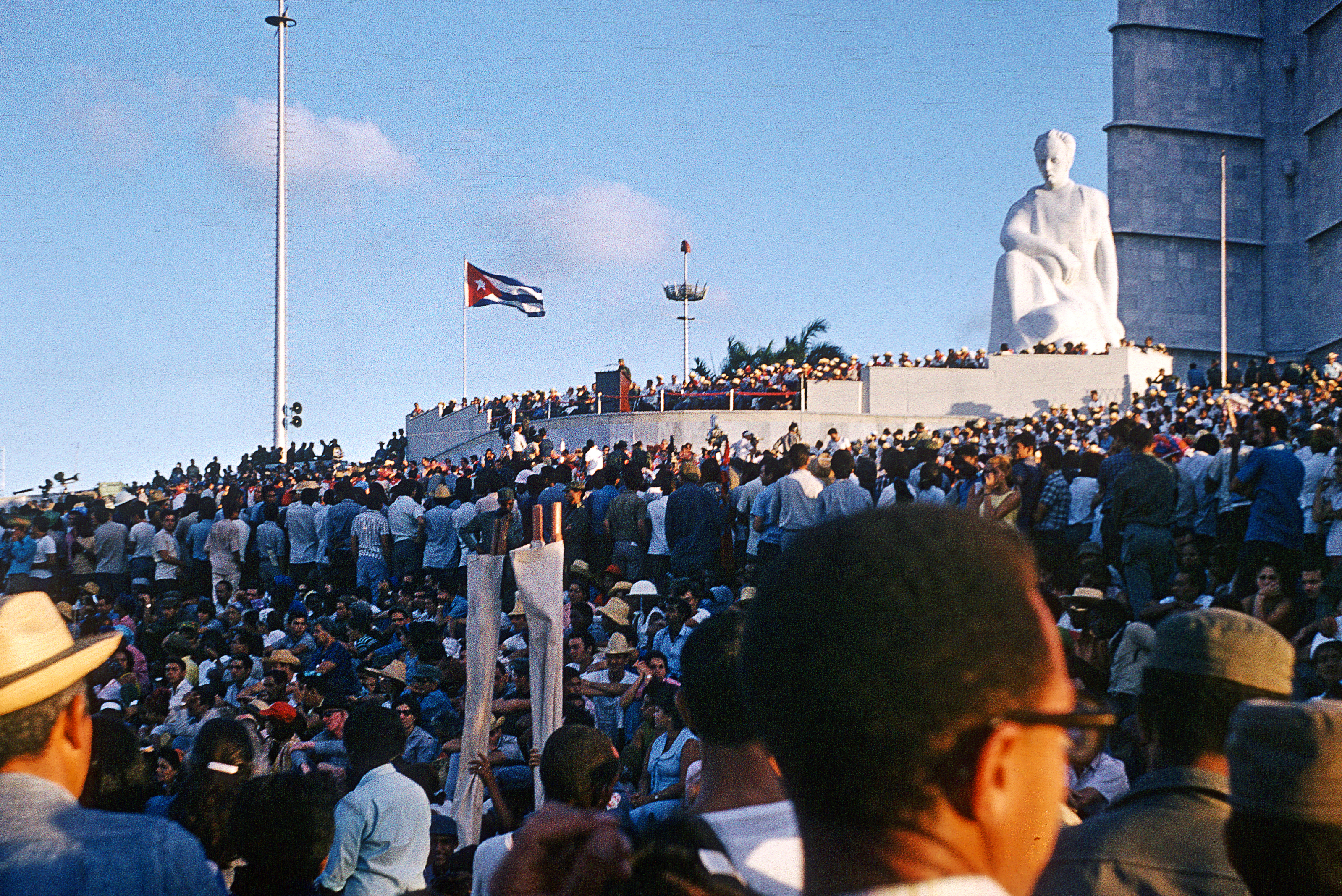 Havanna Anfang 1973 Rede von Fidel Castro vor dem Jose Marti Denkmal